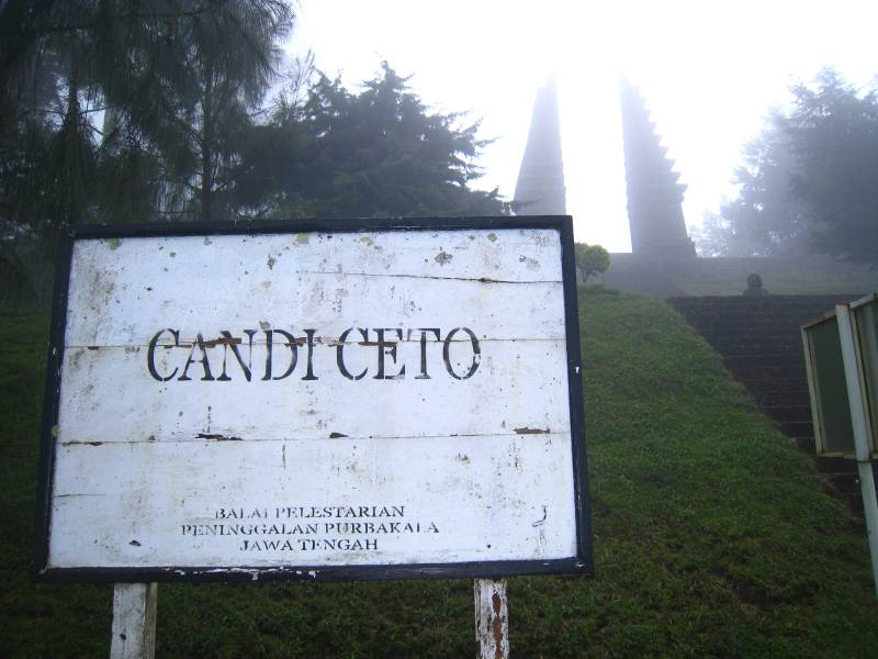 Candi Ceto